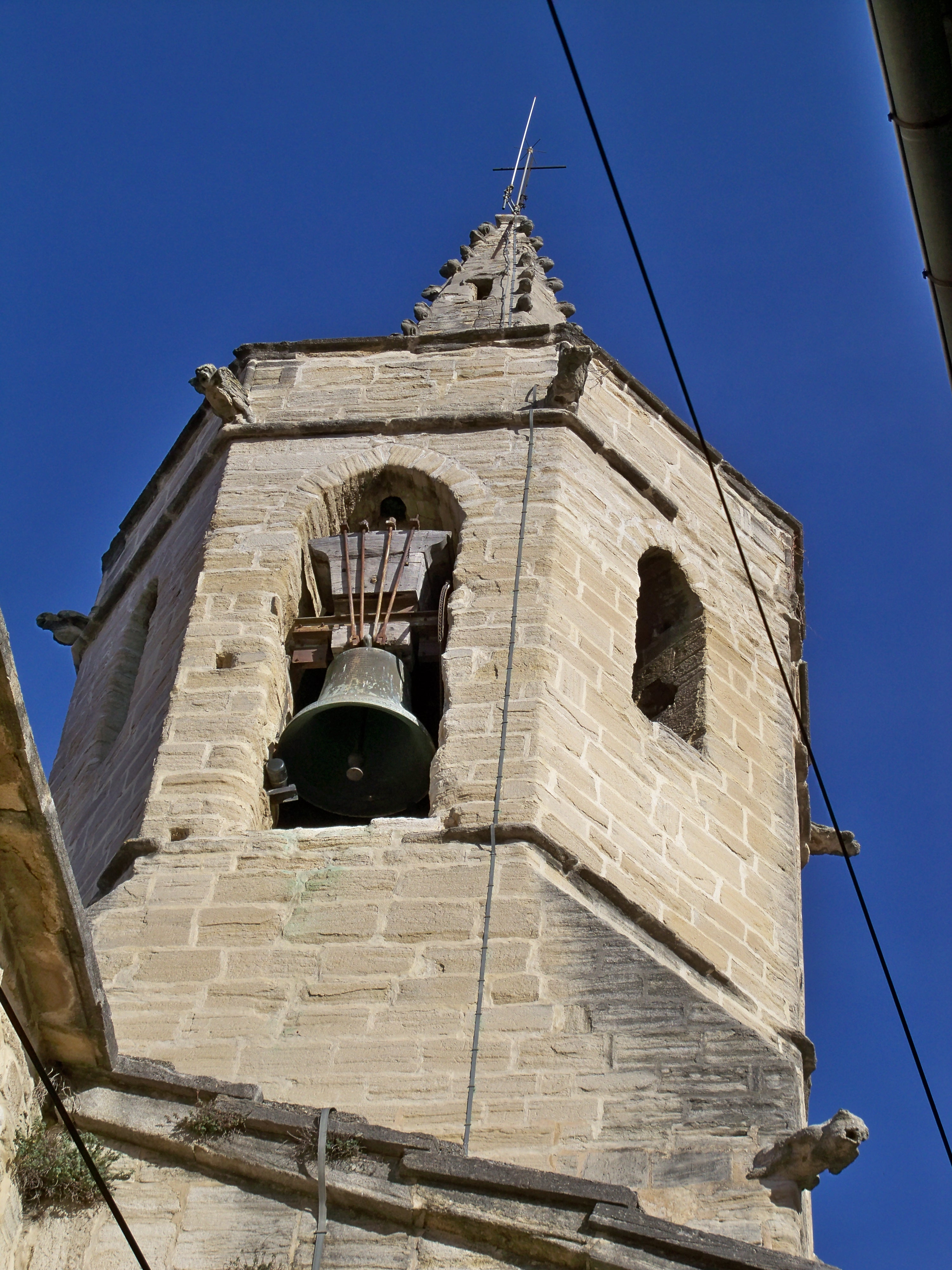 Clocher de l'église de Mazan, Vaucluse, France